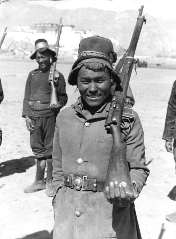 Lhasa, die Neujahrsparade des modernen Militärs vor dem Potala, Soldaten